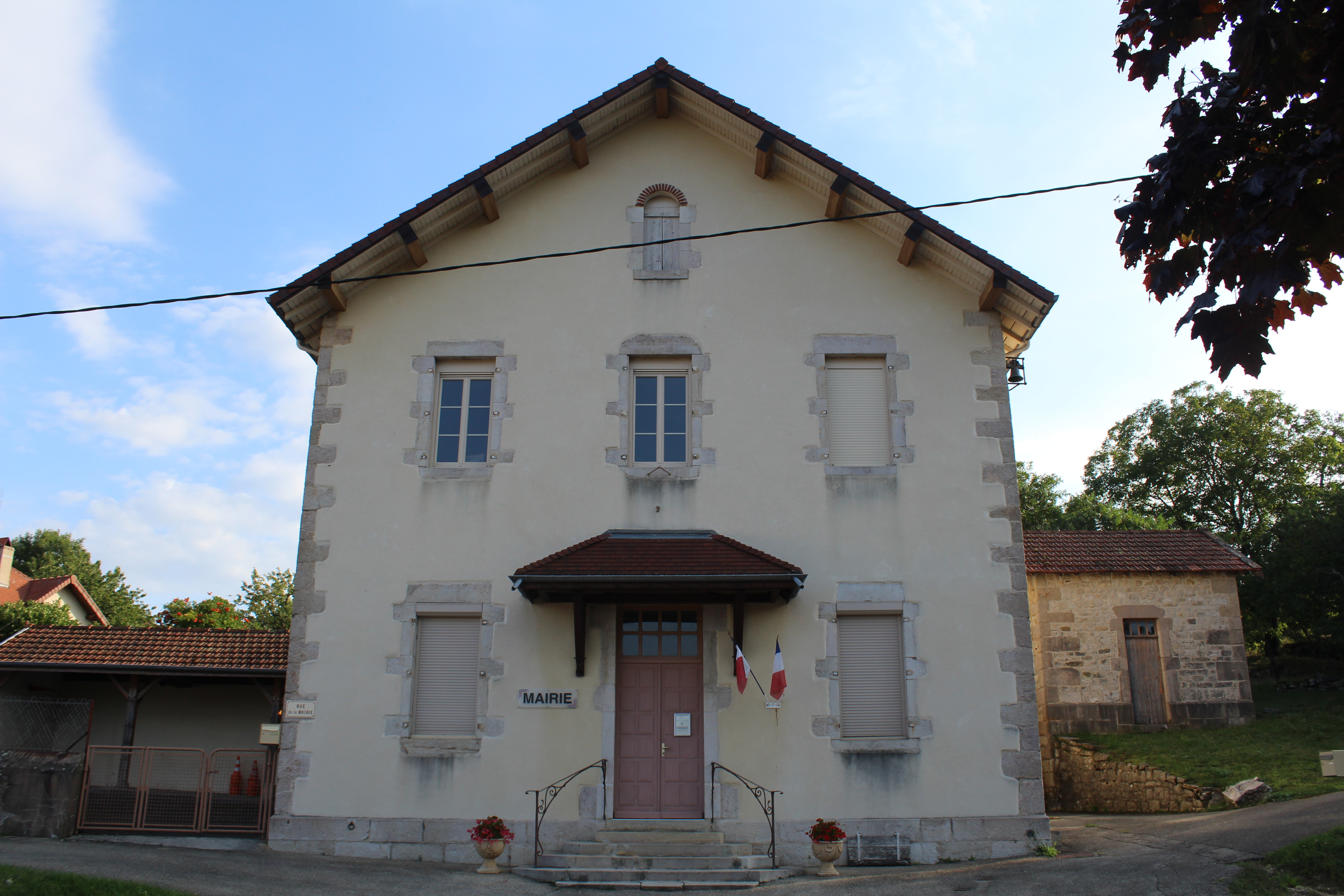 Mairie de Cuisia.